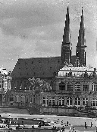 Die Sophienkirche vor 1945 mit kupfergedeckten Turmhauben